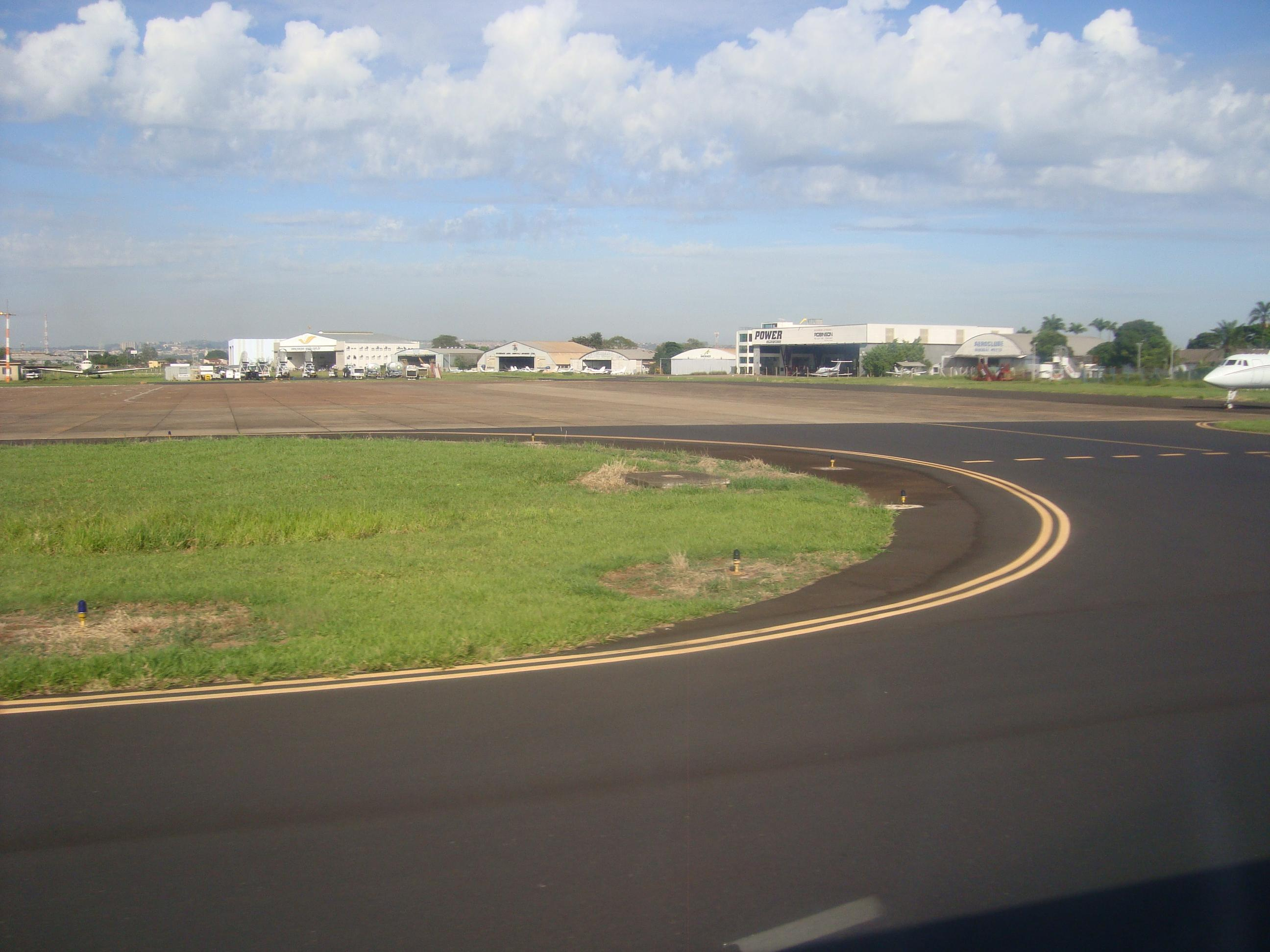 Hangares do Aeroporto Leite Lopes